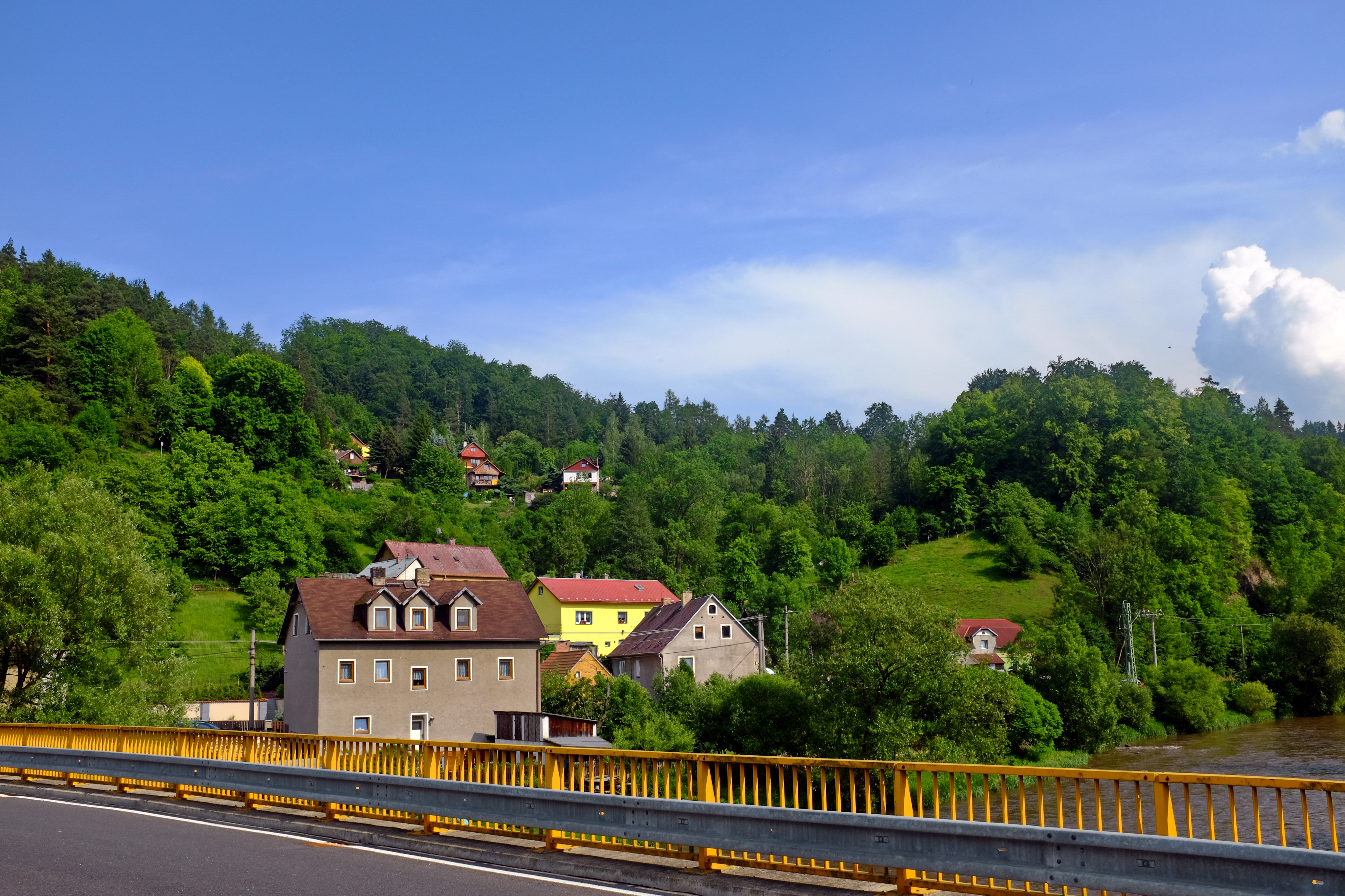 Vojkovice, obec v okrese Karlovy Vary